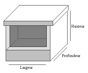 Nichoir semi-ouvert Auteur : C Watier Date : juillet 2006